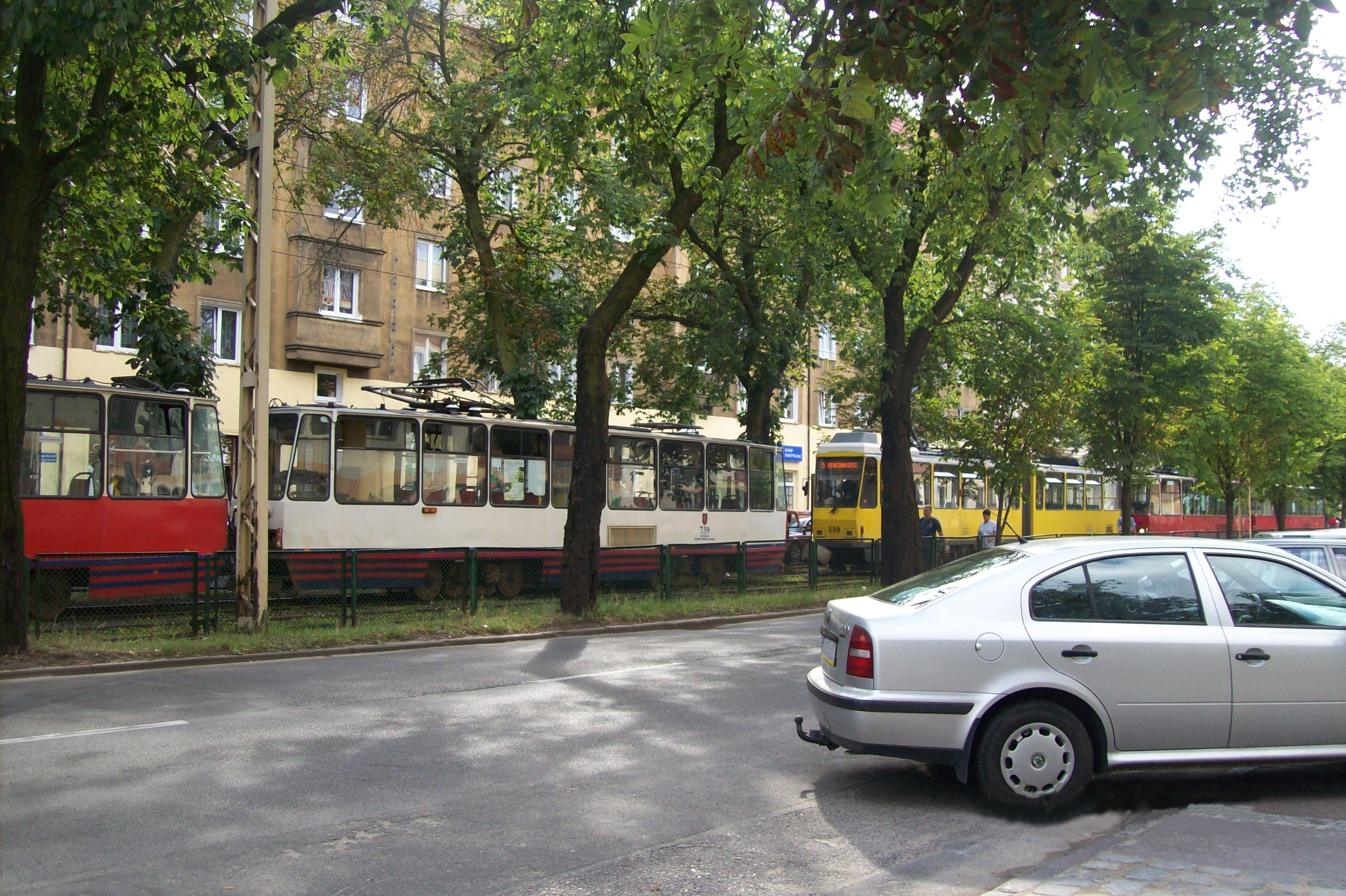 Korek tramwajowy spowodowany awarią. Szczecin, 2008 r.